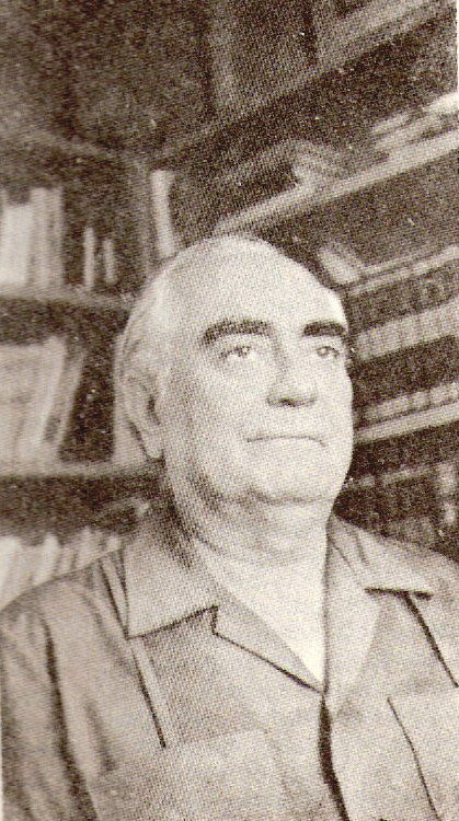 jorge abalos escritor argentino